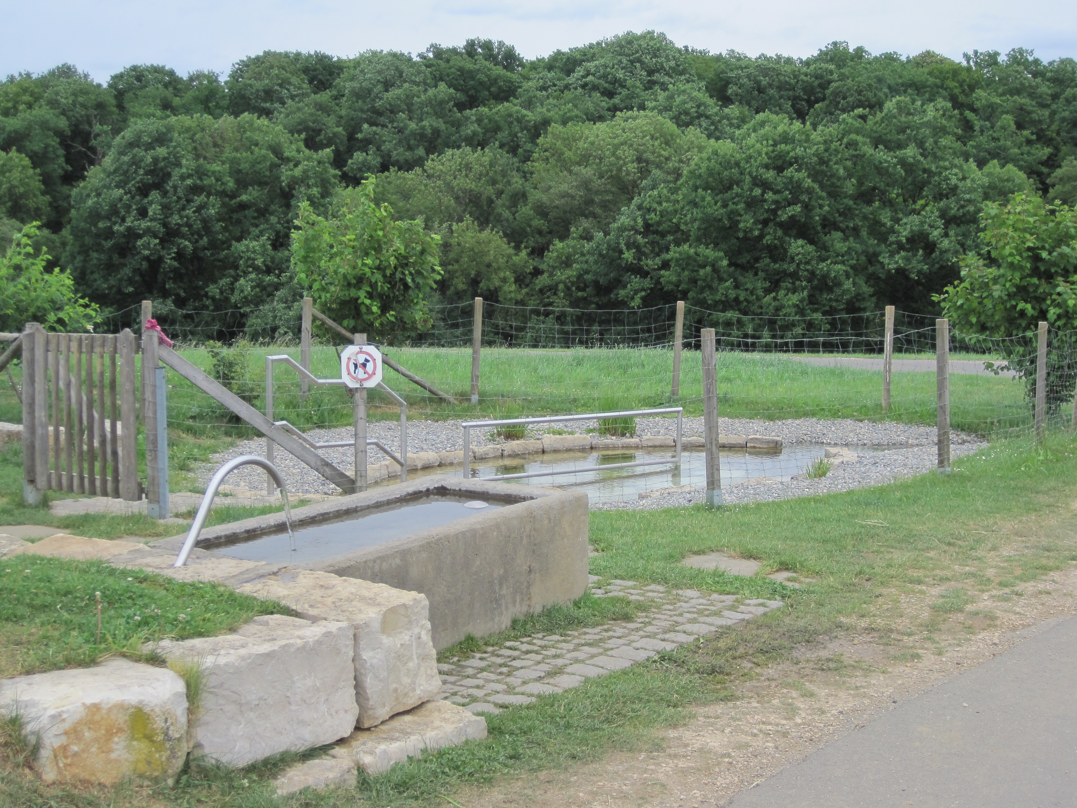 Kneipp-Becken bei Altdorf